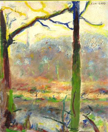 Photo d'un tableau ("Etang et arbres à contre-jour")dont je suis l'ayant-droit